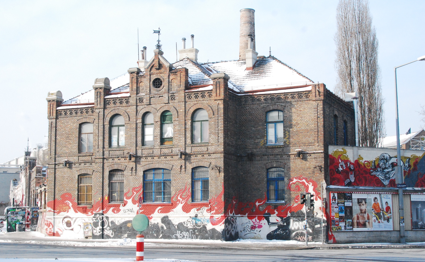 ehemaliger Schweineschlachthof in Sankt Marx (Wien)